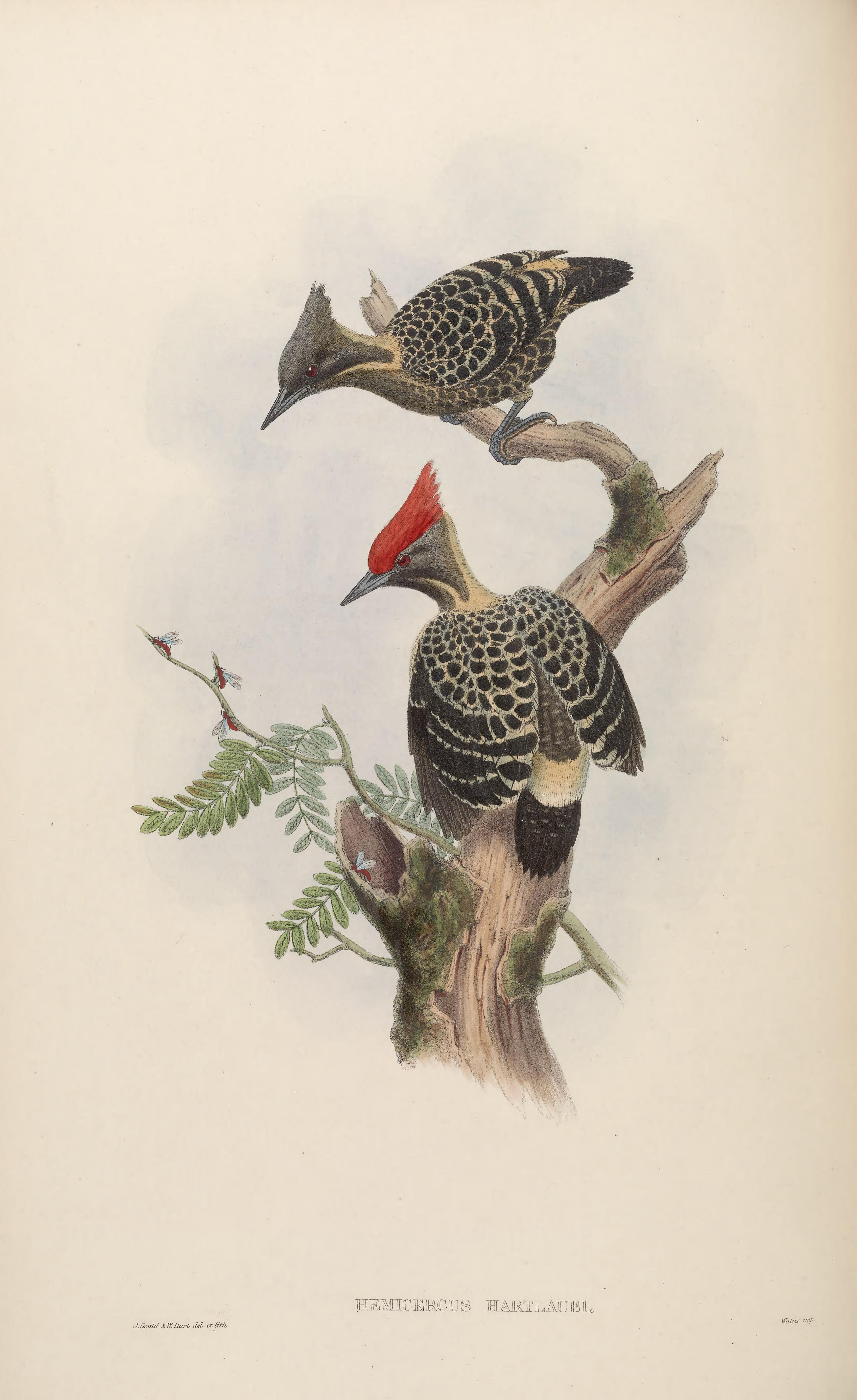 Hemicercus hartlaubi = Hemicircus concretus sordidus[1][2]